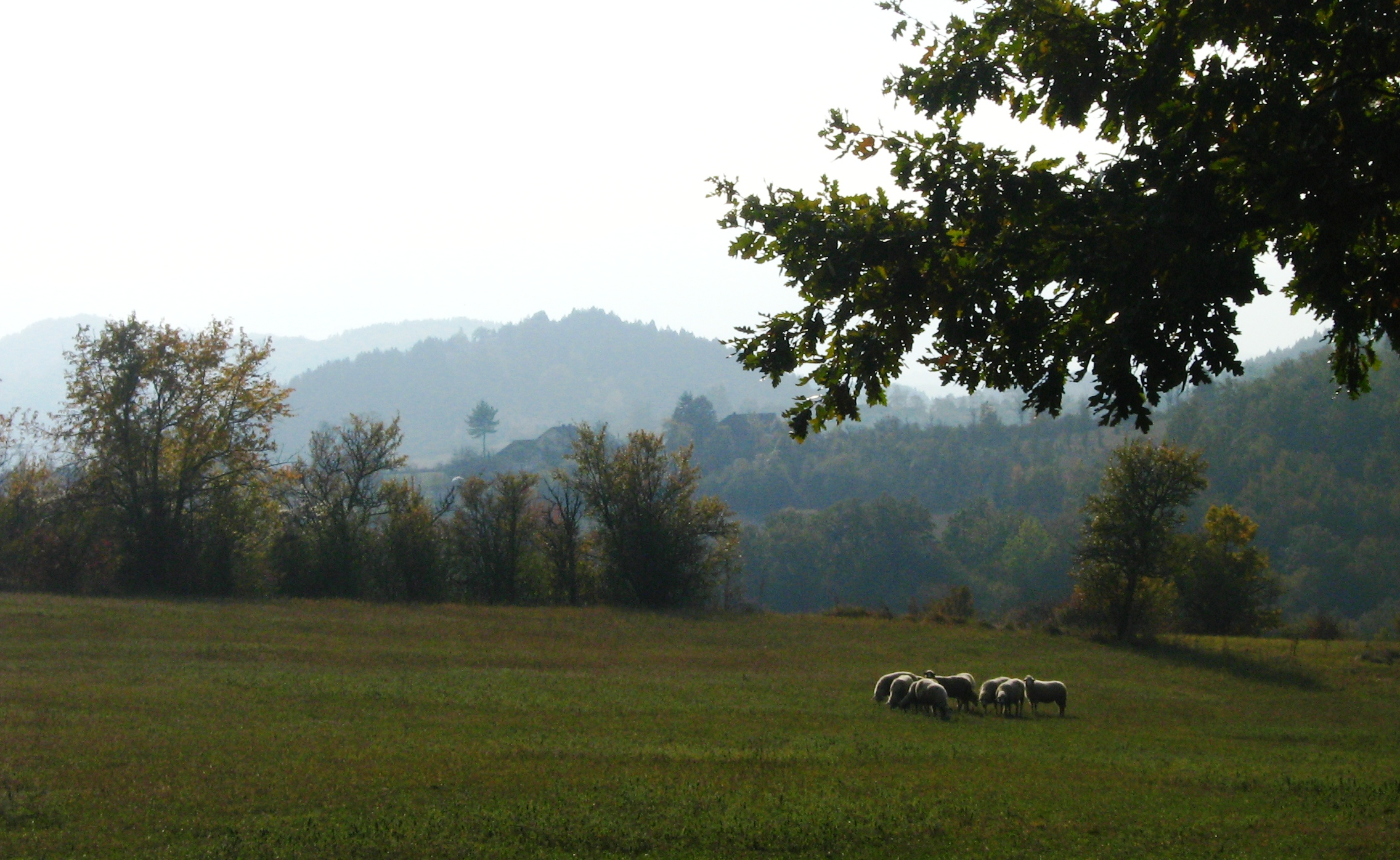 Предео западне Србије - село Скакавци код Косјерића.